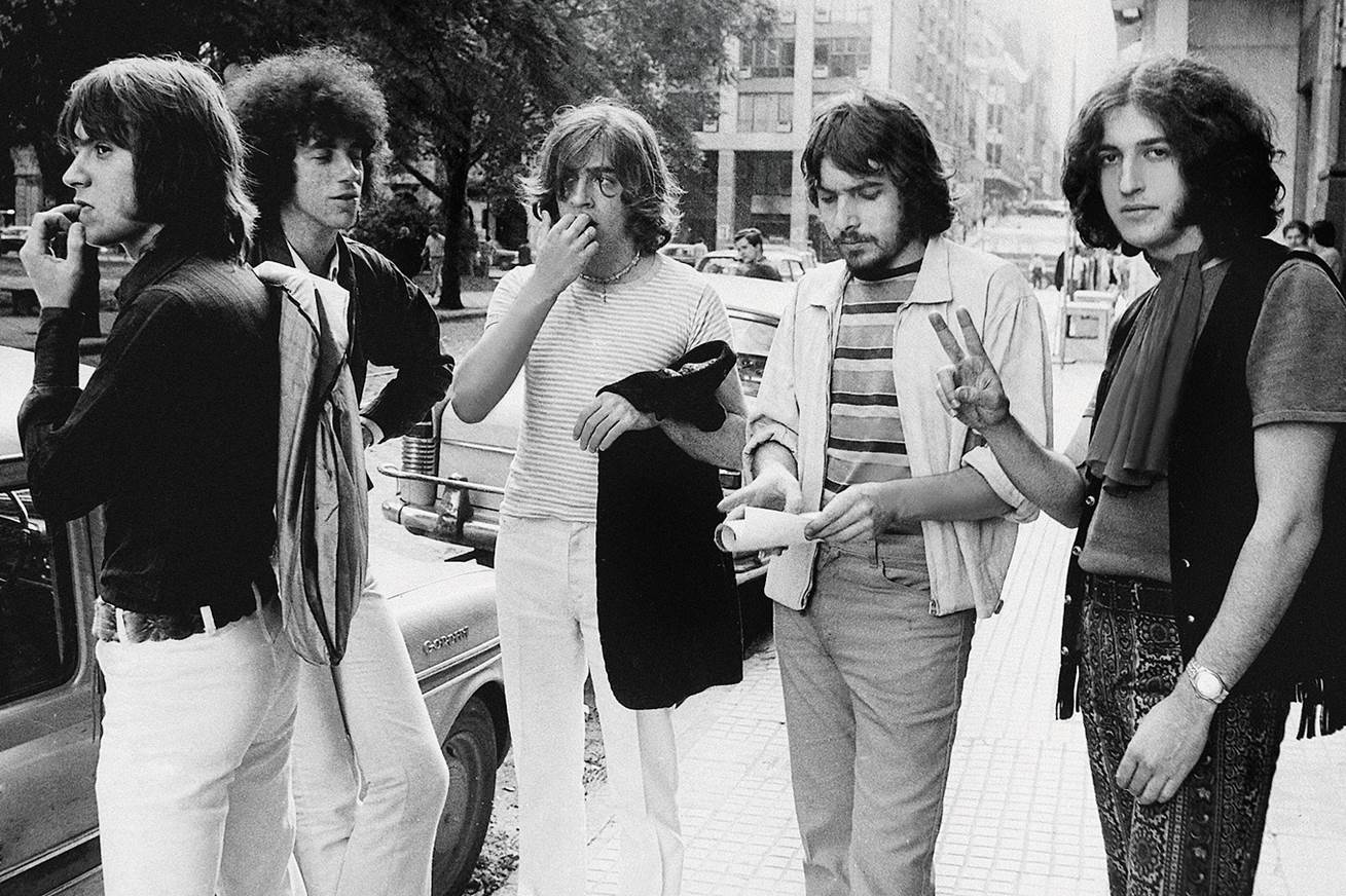 Los Gatos en su segunda formación. De izquierda a derecha: Alfredo Toth , Óscar Moro, Litto Nebbia, Pappo y Ciro Fogliatta.